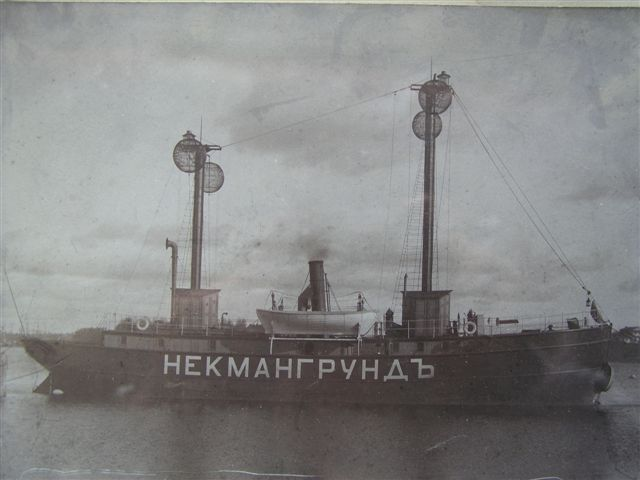 Плавучий маяк "Некмангрунд" ( "Nekmangrund" )